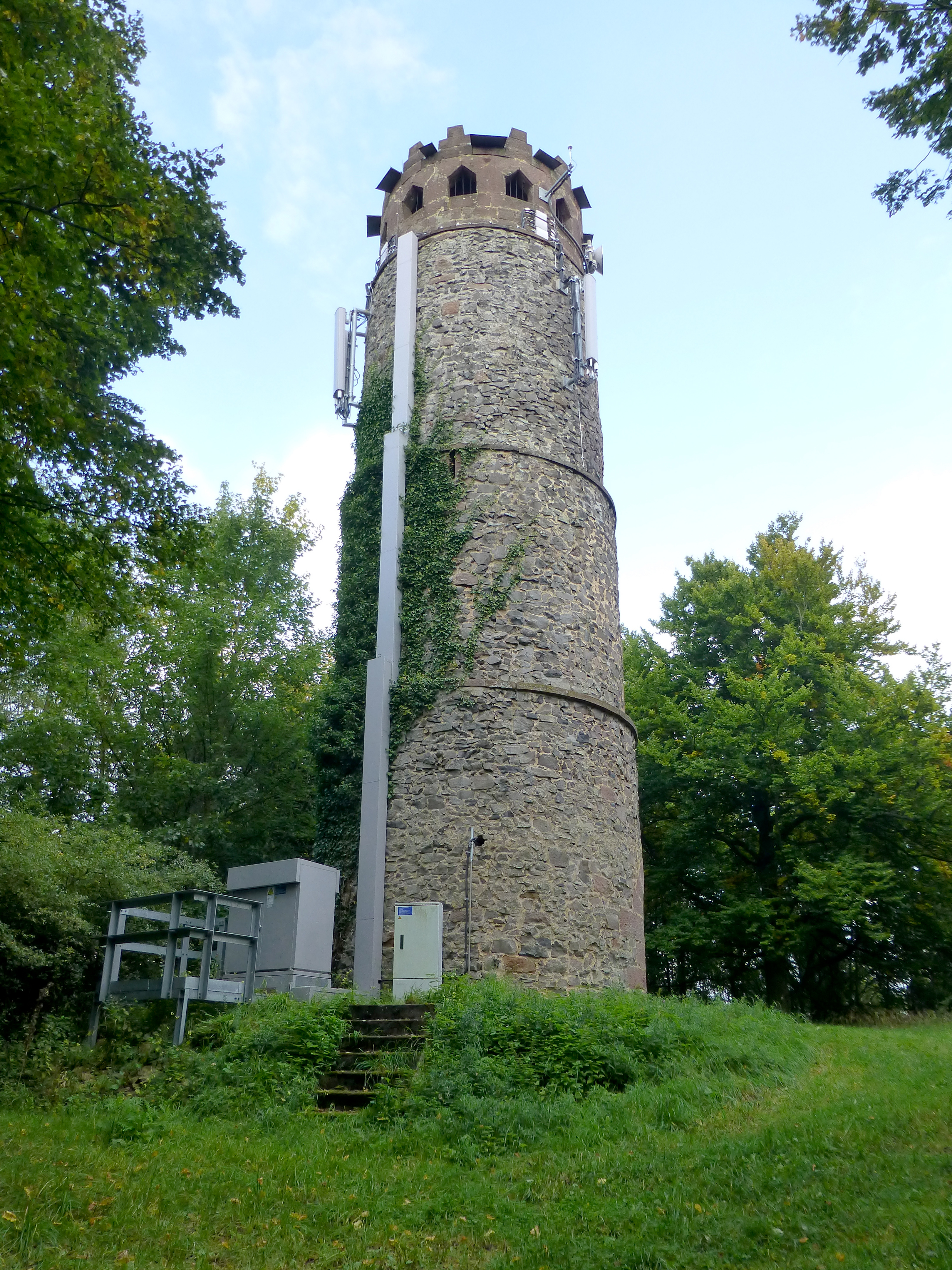 Klauskopfturm bei Riede (Bad Emstal); am Turm die Versorgungsanlage zum Betrieb von Mobilfunkantennen